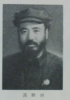 中國人民政治協商會議第一屆全體會議代表